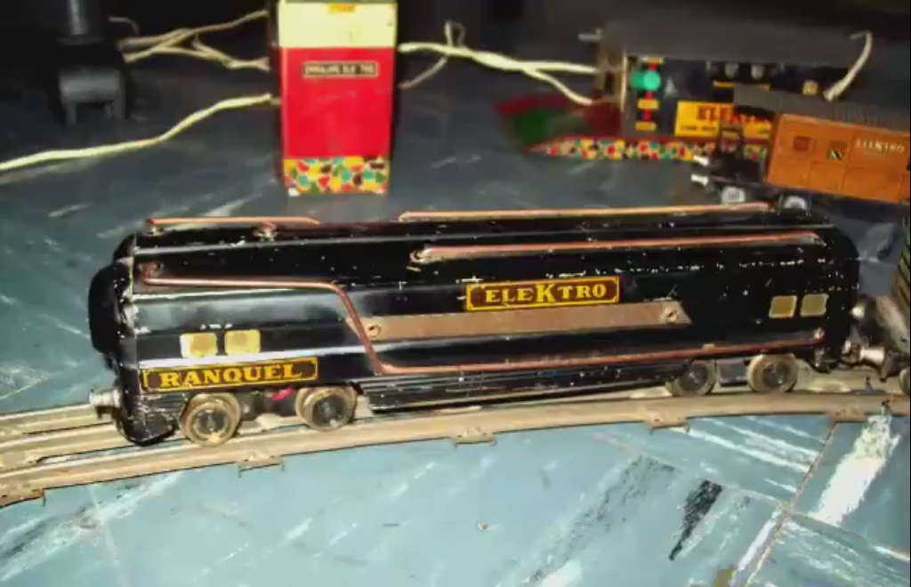 Locomotora diésel Elektro N°1069 Ranquel.